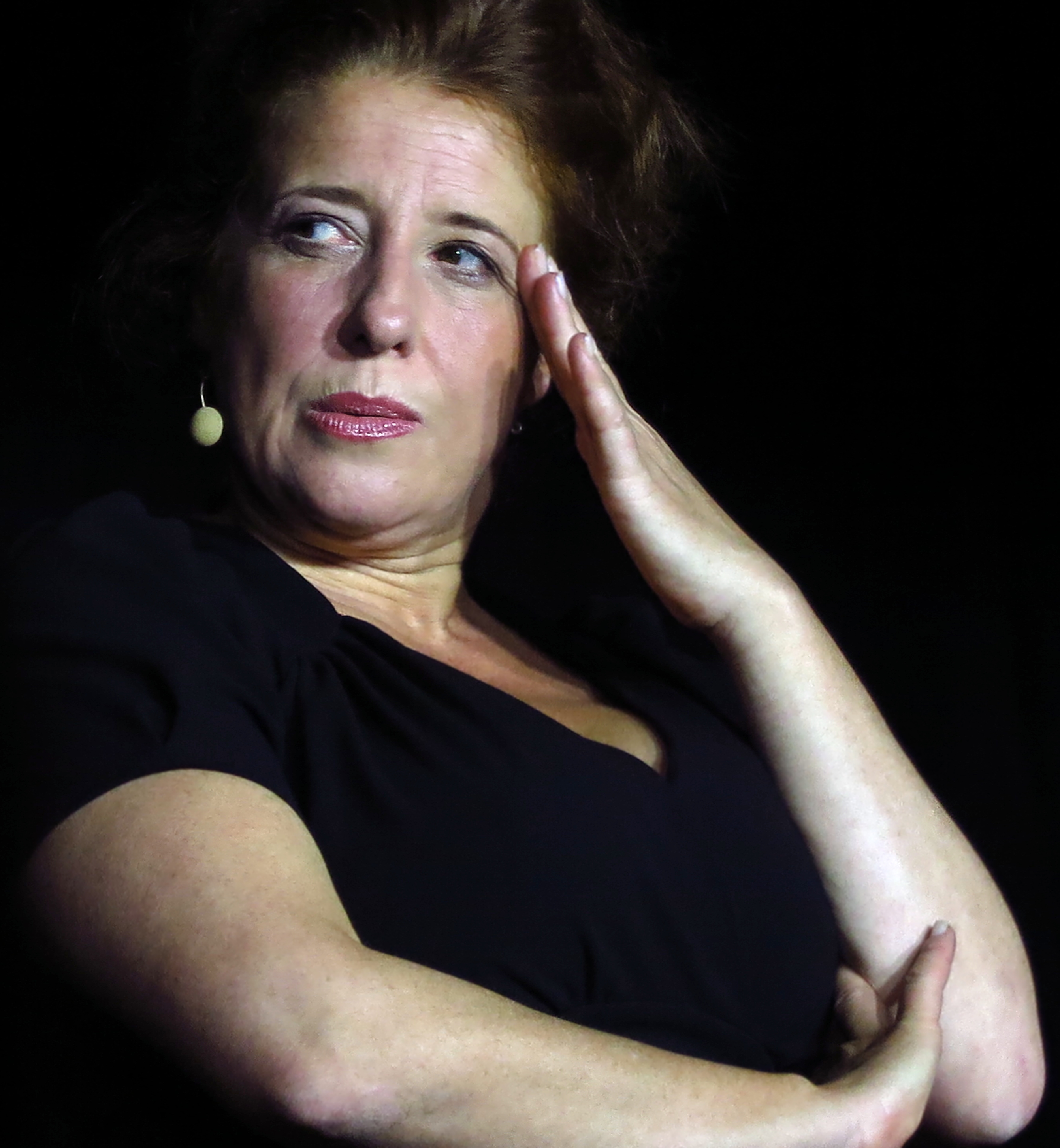 Kabarettistin Luise Kinseher im September 2014 in Etterschlag